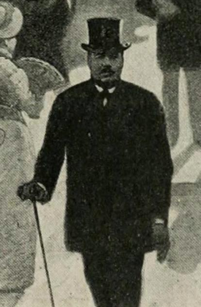 M. Marinoni, du Petit Journal. Détail d'une série de photographies du panorama le "Tout-Paris" peint par Charles Castellani et présenté lors de l'exposition universelle de 1889.